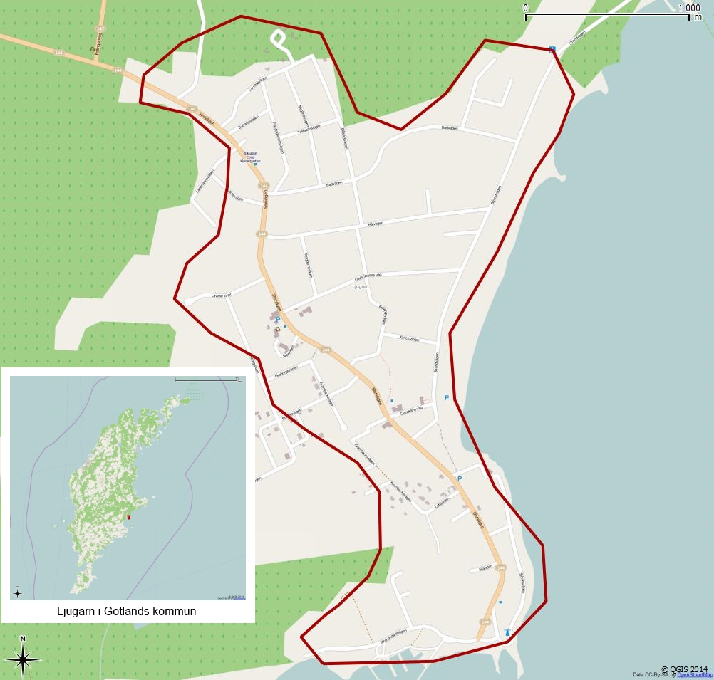 Tätorten Ljugarns gränser 1990 enligt Atlas över rikets indelningar 1992.